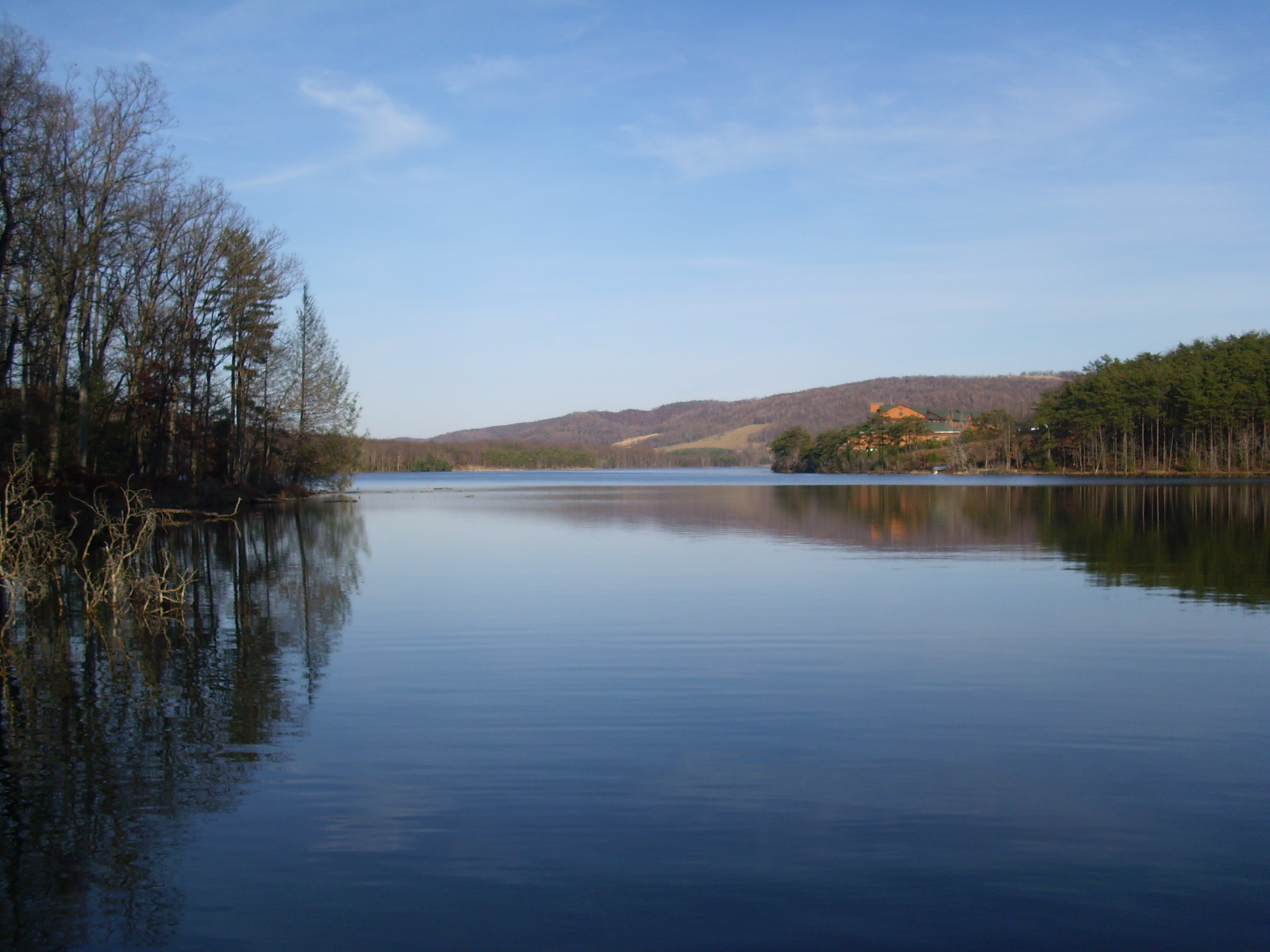 Lake Habeeb from dock